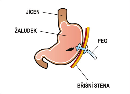 perkutánní endoskopická gastrostomie